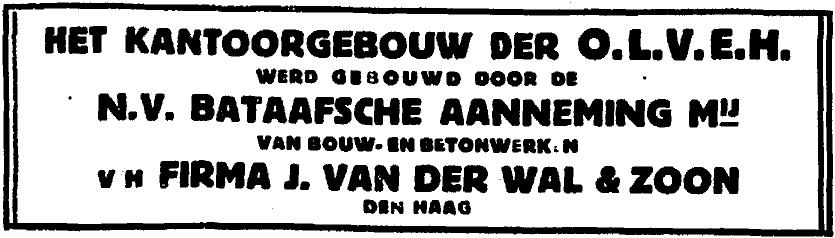 Advertentie van de Bataafsche Aanneming Mij van Bouw- en Betonwerken v/h Firma J. van der Wal en Zoon. Afkomstig uit Het Vaderland, zaterdag 23 juli 1932, avondblad C, p. 1.